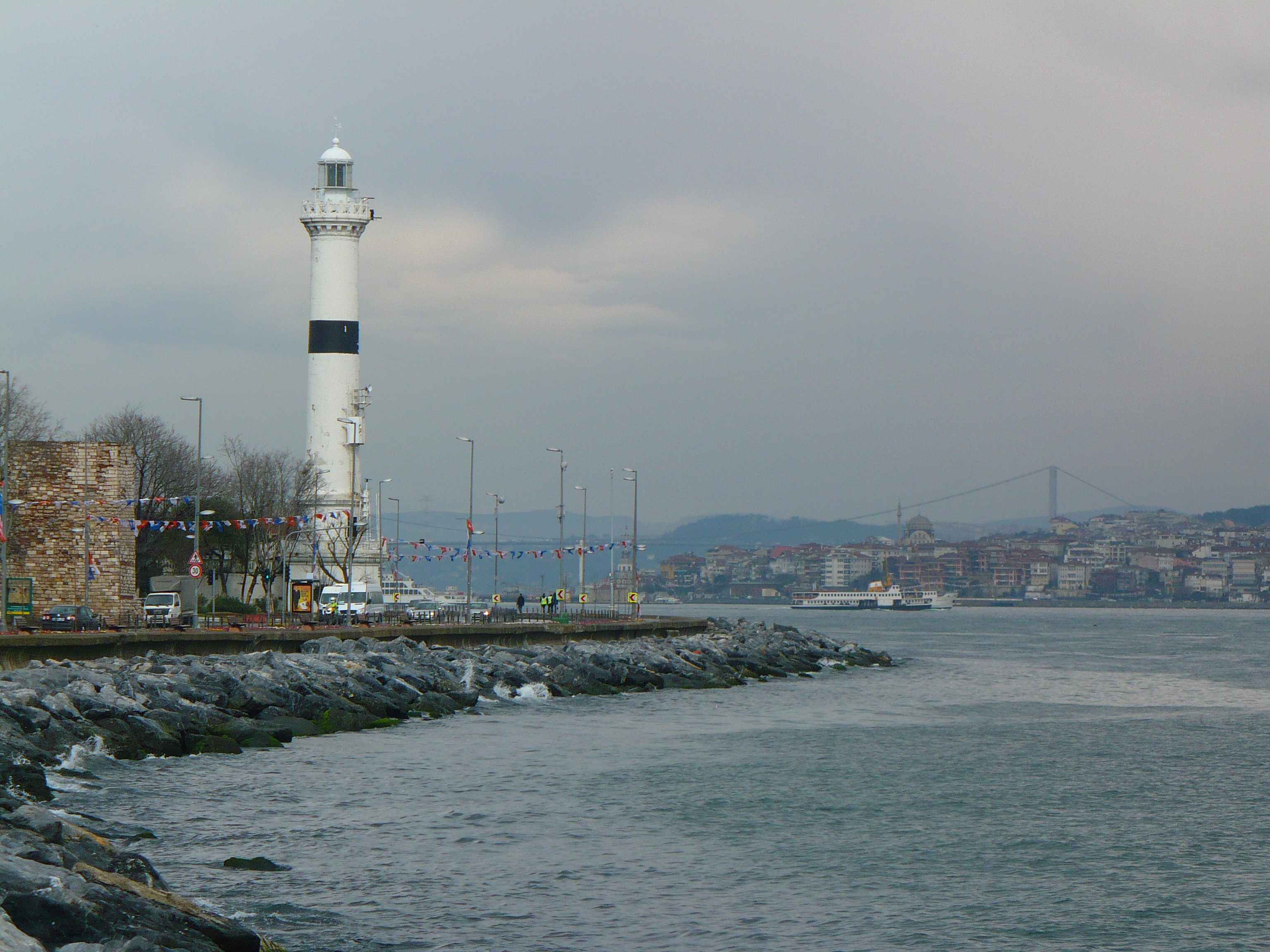 İstanbul'dan görüntüler